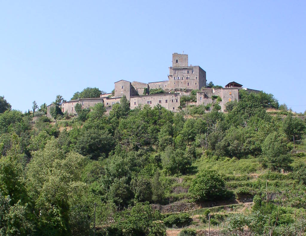 Schloss Montréal (Ardèche), castle